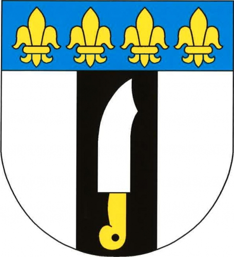 znak, Ošelín, okres Tachov